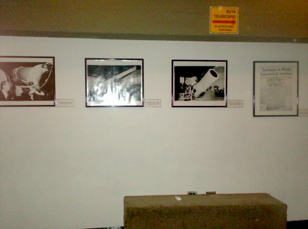 Area de Museo en las instalaciones del Observatorio Astronómico Nacional de Llano del Hato, Merida - Venezuela